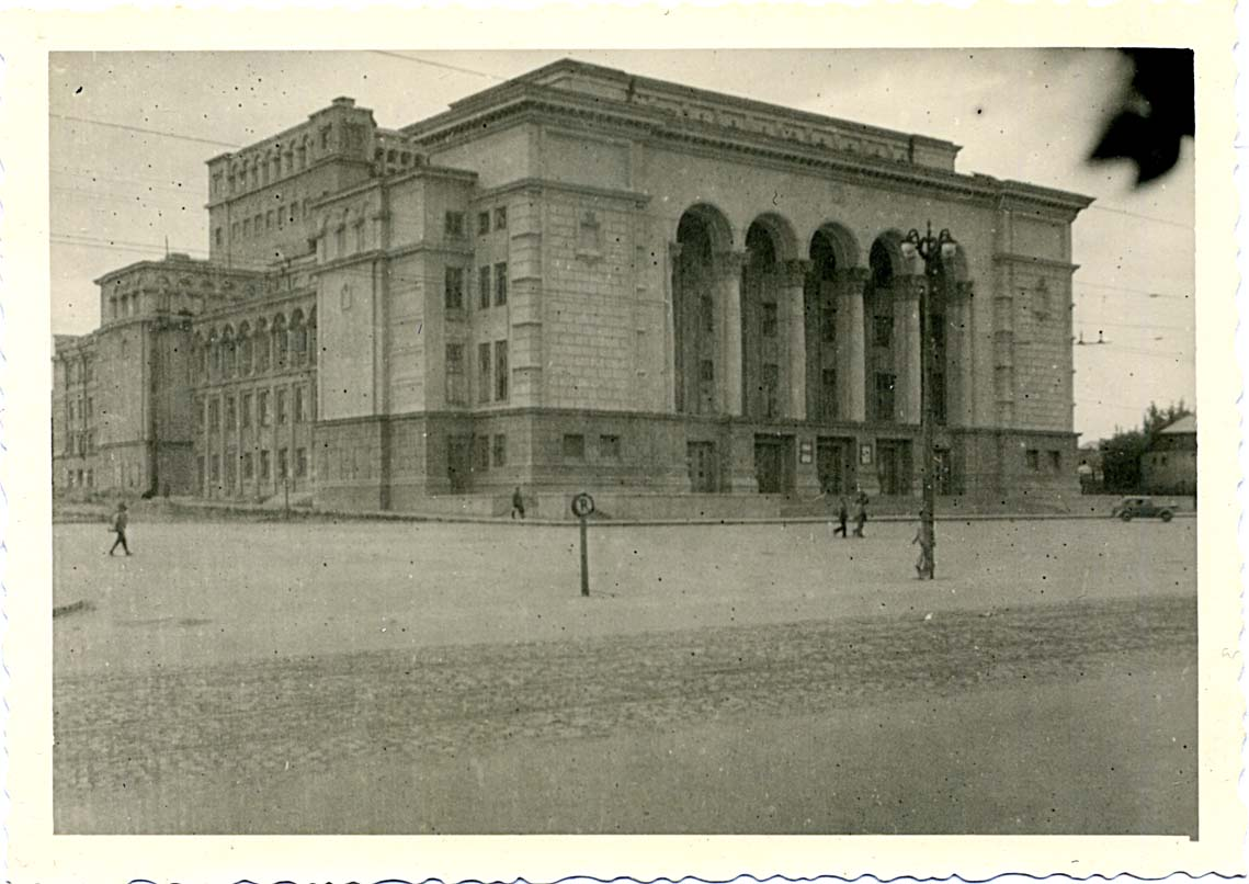 1941-1943. Оперный театр во время оккупации